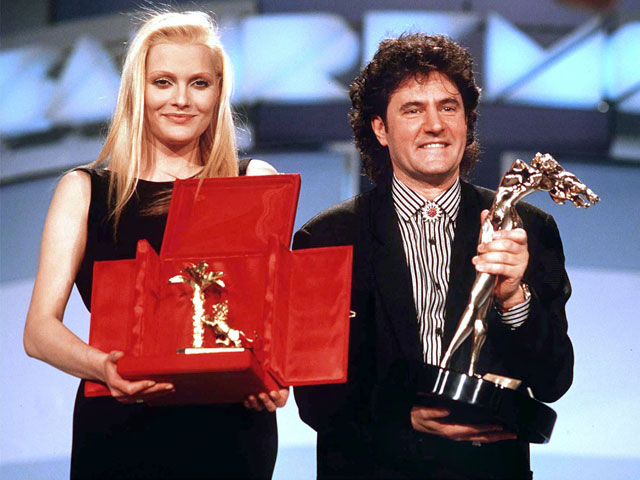 Sanremo, Teatro Ariston, 25 febbraio 1989. Da sinistra: i cantanti Anna Oxa e Fausto Leali premiati come vincitori del Festival di Sanremo 1989 con la canzone Ti lascerò. Licensing 1989 02 25 1989 02 25 1989 02 25